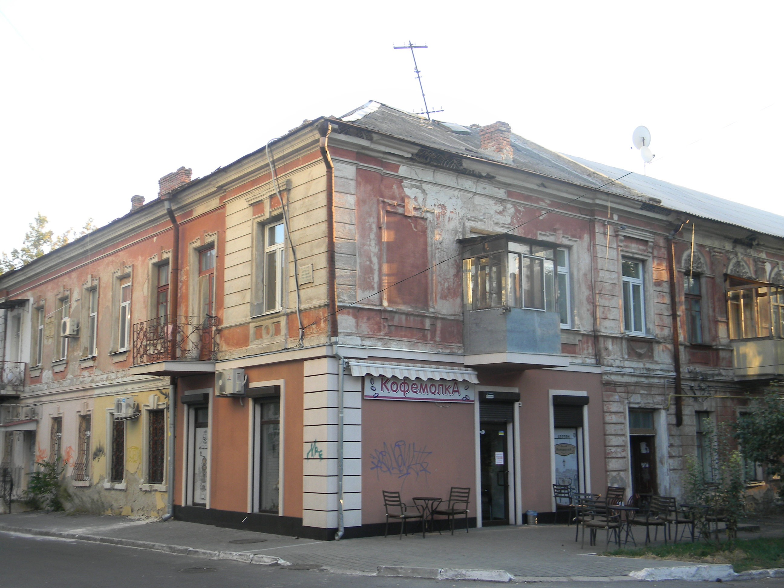 Здание, в котором жил Коста Хетагуров, Херсон, ул. 9 Сичня, 15 (17)